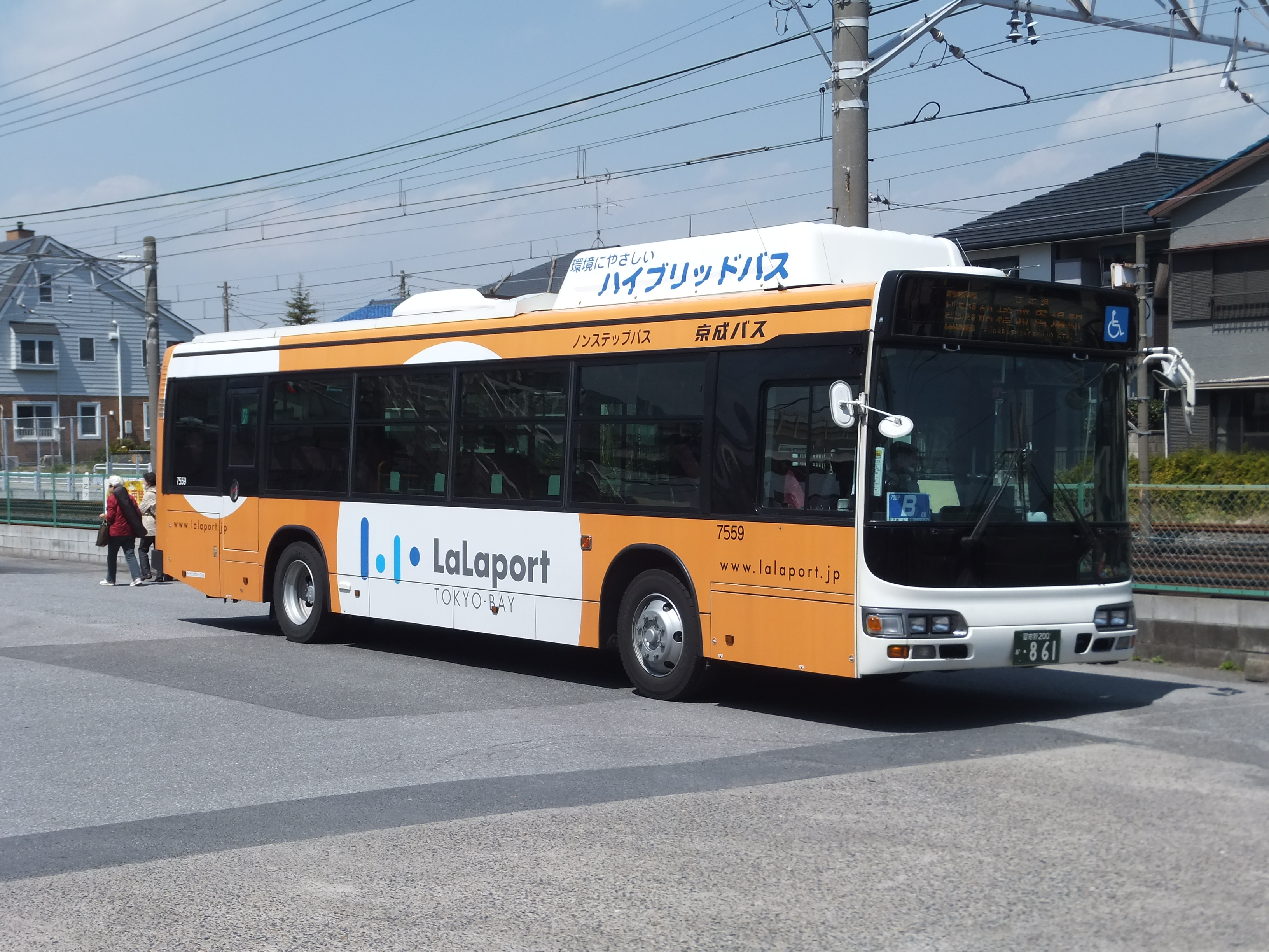 ららぽーとTOKYO-BAY送迎シャトルバス。船橋競馬場駅前にて。